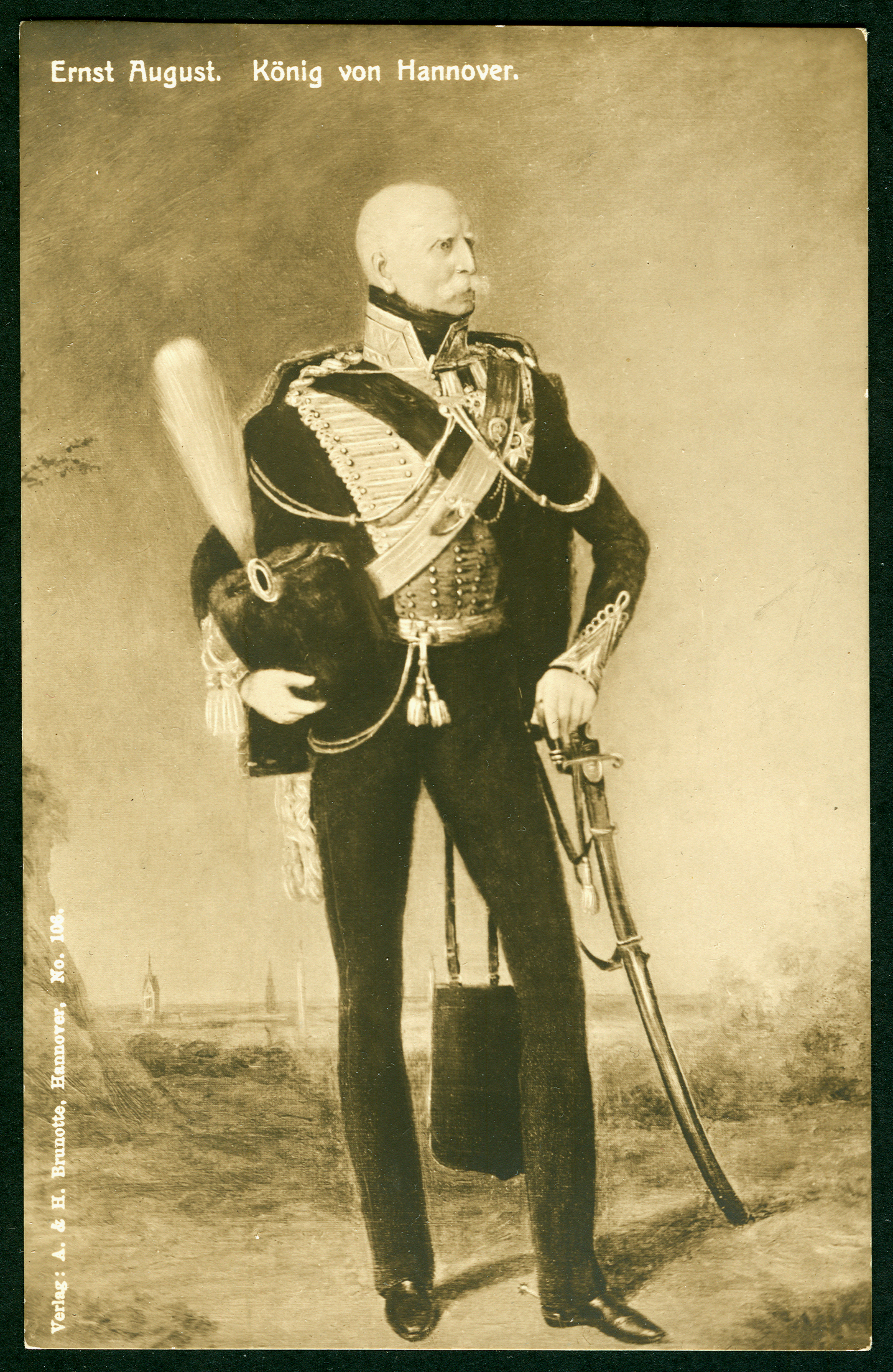 Ansichtskarte Nummer 106 aus dem Verlag von A. & H. Brunotte, Hannover mit dem Titel "Ernst August, König von Hannover, im Hintergrund die Kirchtürme der damaligen Stadt Hannover ...